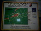 Plattegrûn Kornhorn.